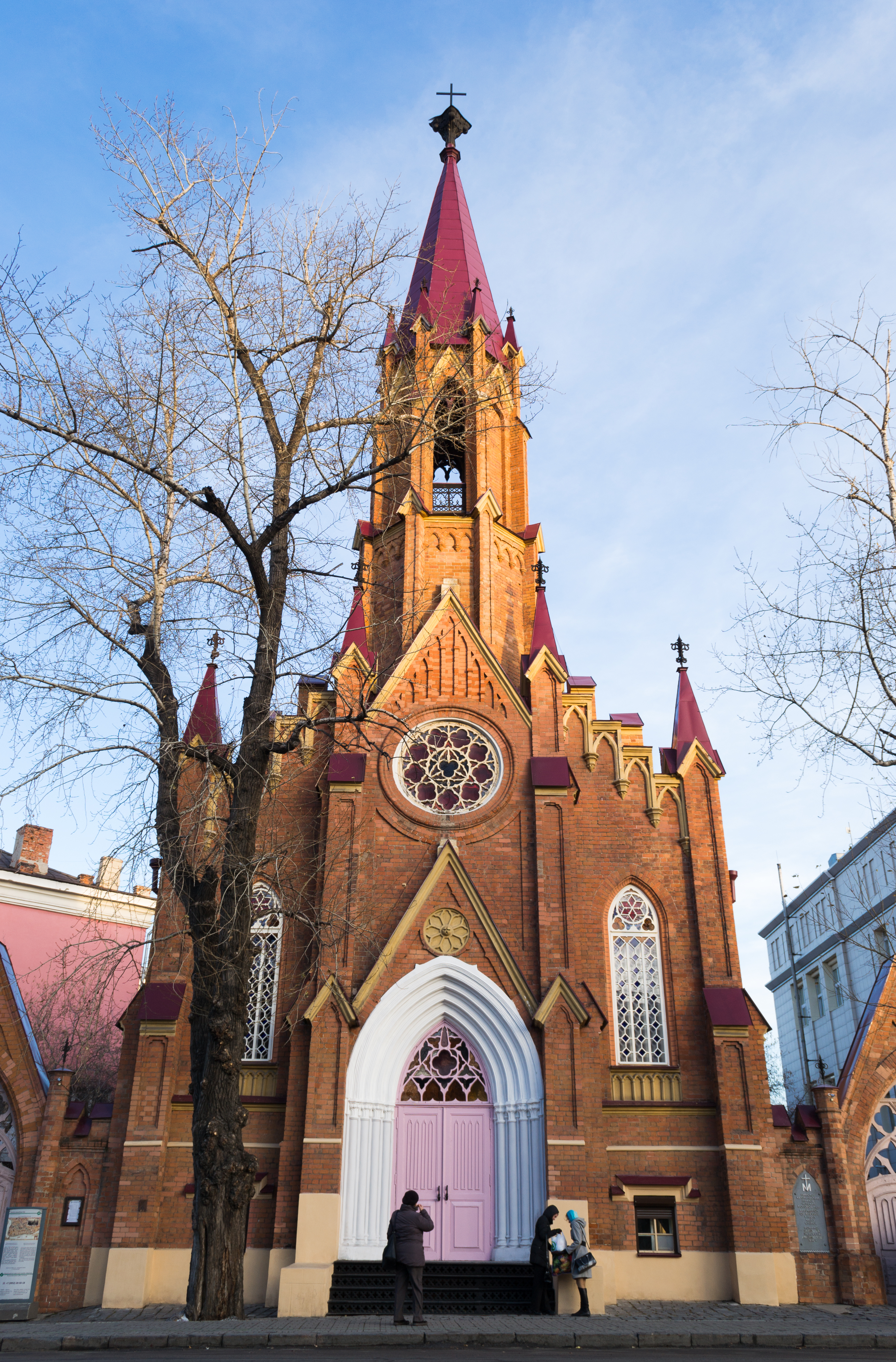 Храм римско-католический (Иркутская область, Иркутск, Сухэ-Батора улица, 1)